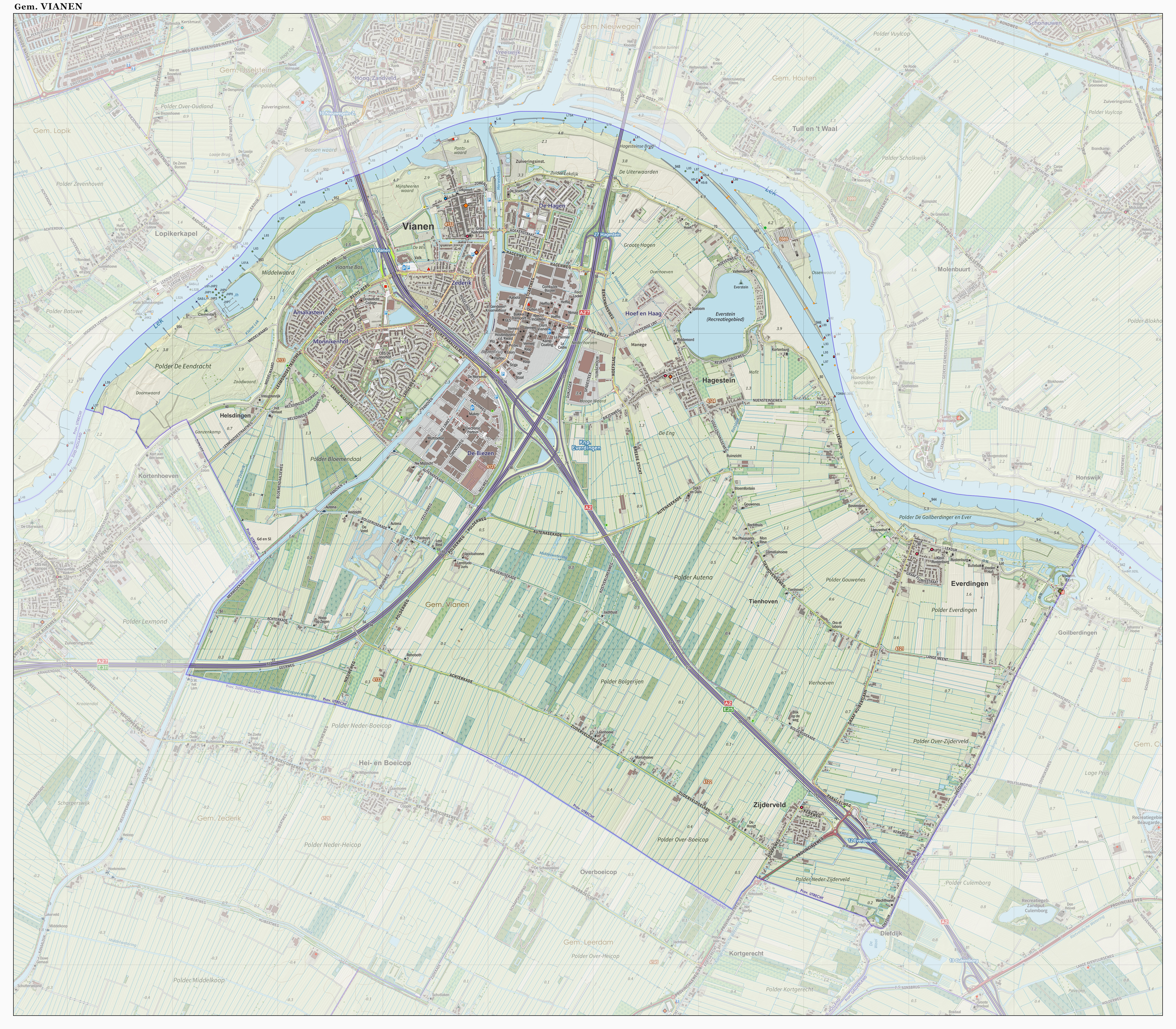 Topografische gemeentekaart. Resolutie: 400 pixels/km. Kaartbeeld samengesteld uit de open geodata van de Top10NL en Top25namen (Kadaster), Creative Commons-BY licentie. Gebouwvlakken uit open geodata BAG extract. Wegen uit de OpenStreetMap, OpenStreetMap community. Reliëfschaduw uit de Actuele Hoogtekaart AHN2. Samenstelling en kleurenschema: Jan-Willem van Aalst, met QGIS. Zie ook de Legenda.